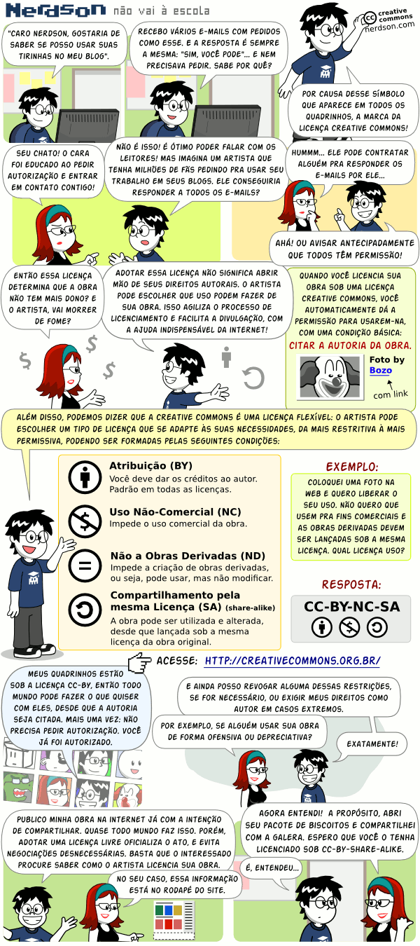 tira explicando o funcionamento do Creative Commons.